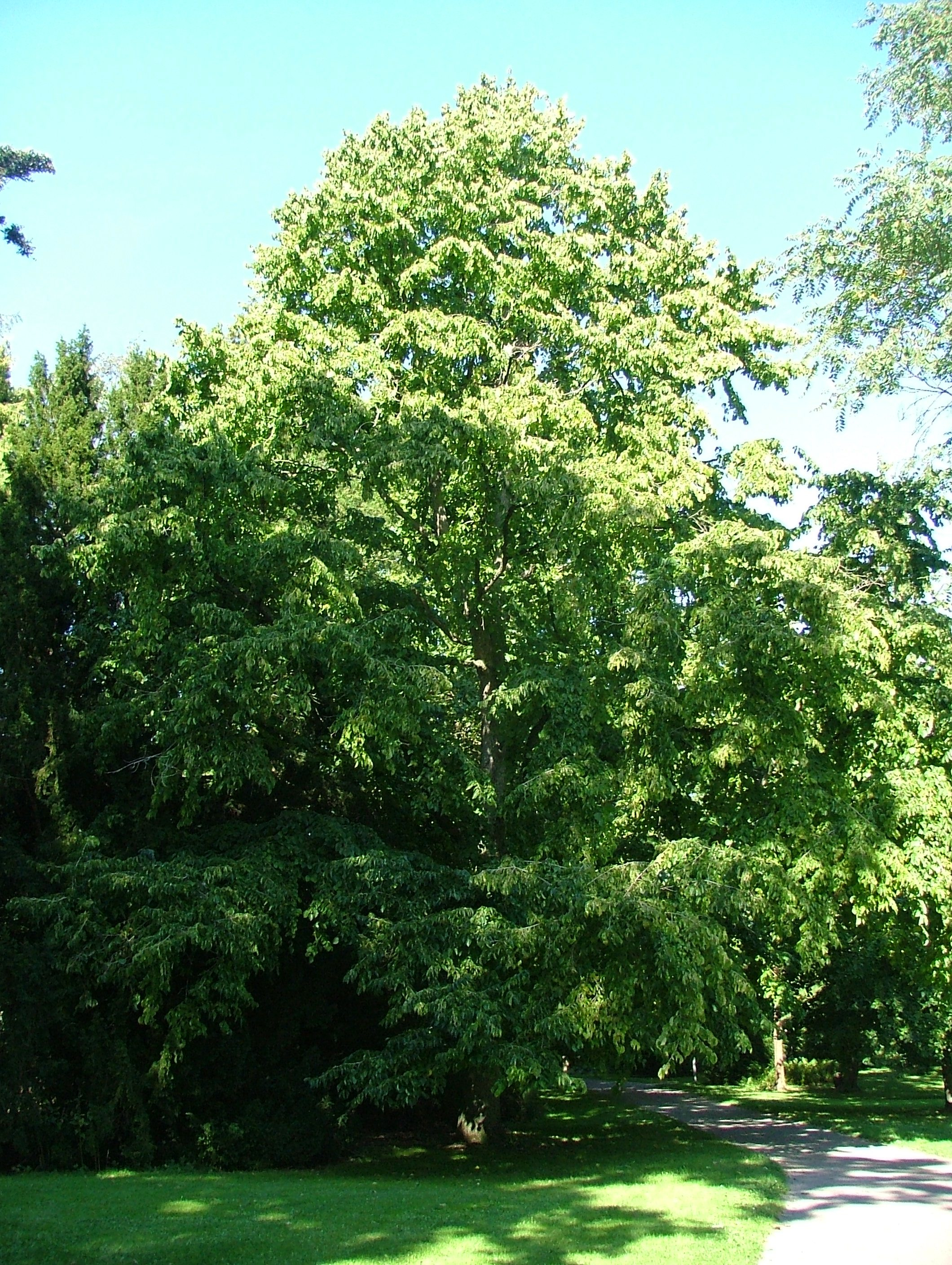 Turkisk hassel